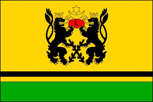 Vlajka obce Lysice